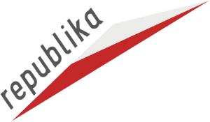 logo kanału z 2013